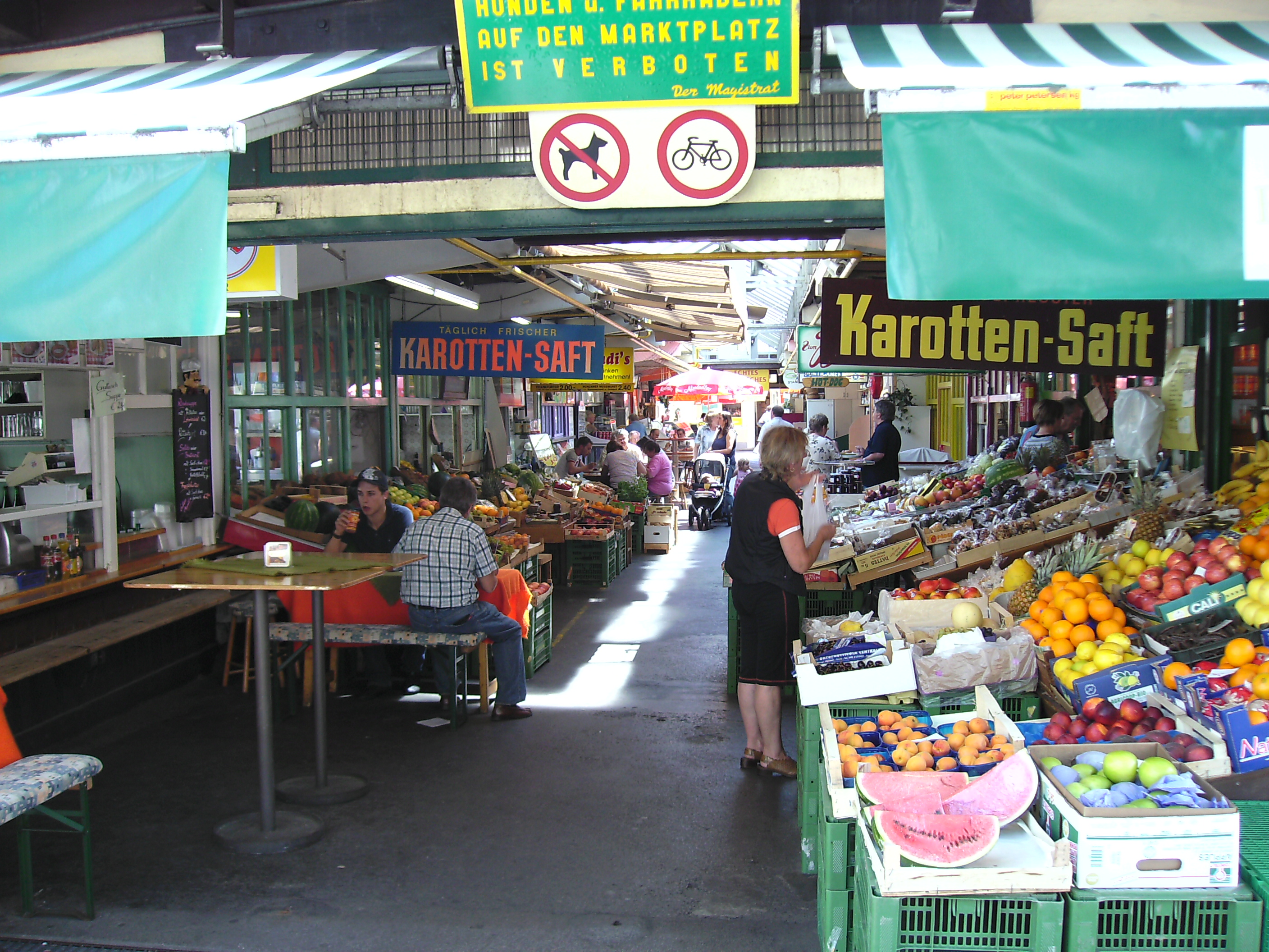 Klagenfurt Tagesmarkt Benediktinerplatz